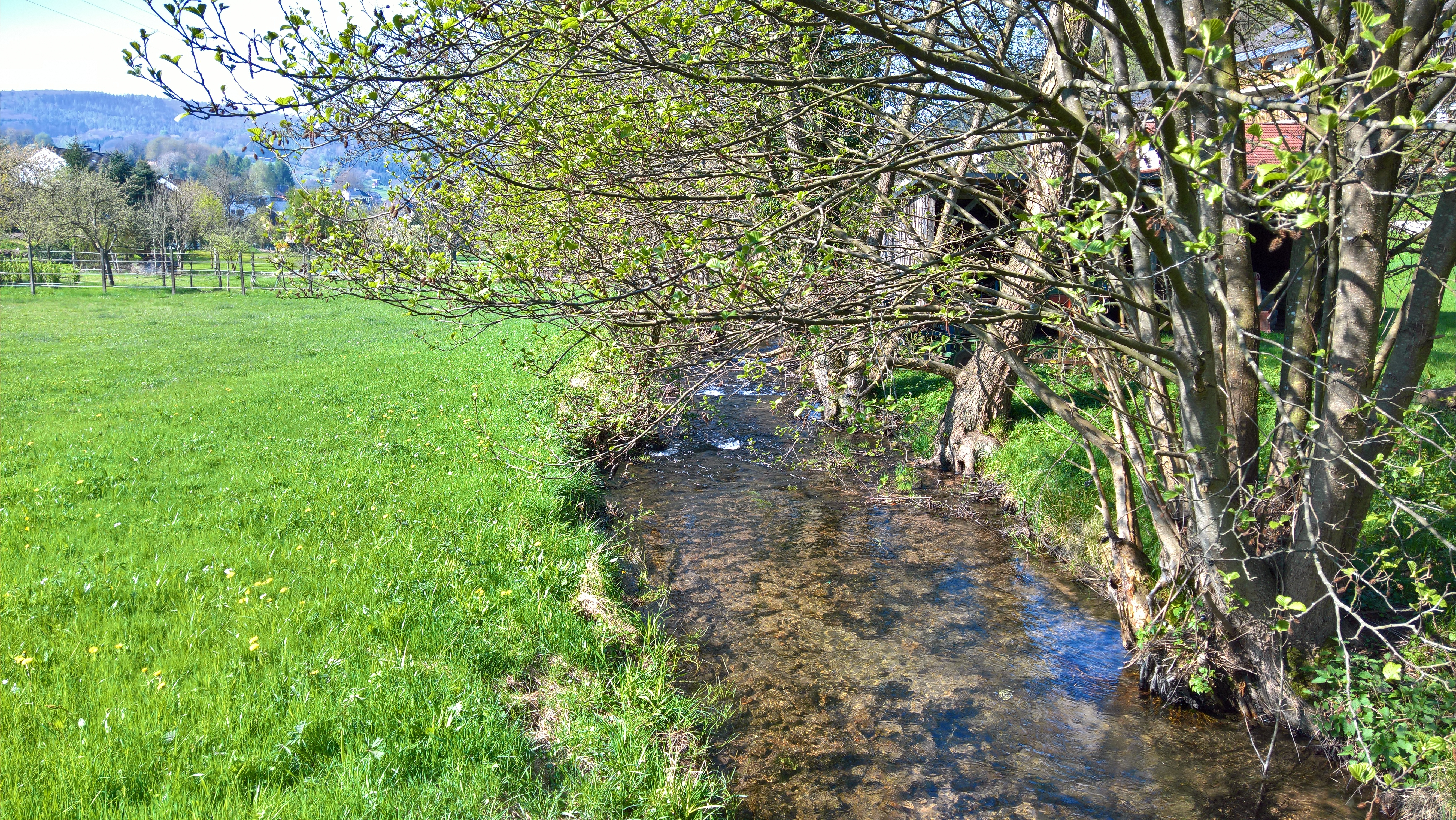 Blick von der Infotafel des Kulturweges über den Burgstall nach Südwesten zum Ort Dammbach entlang des Elsava Zuflusses Dammbach